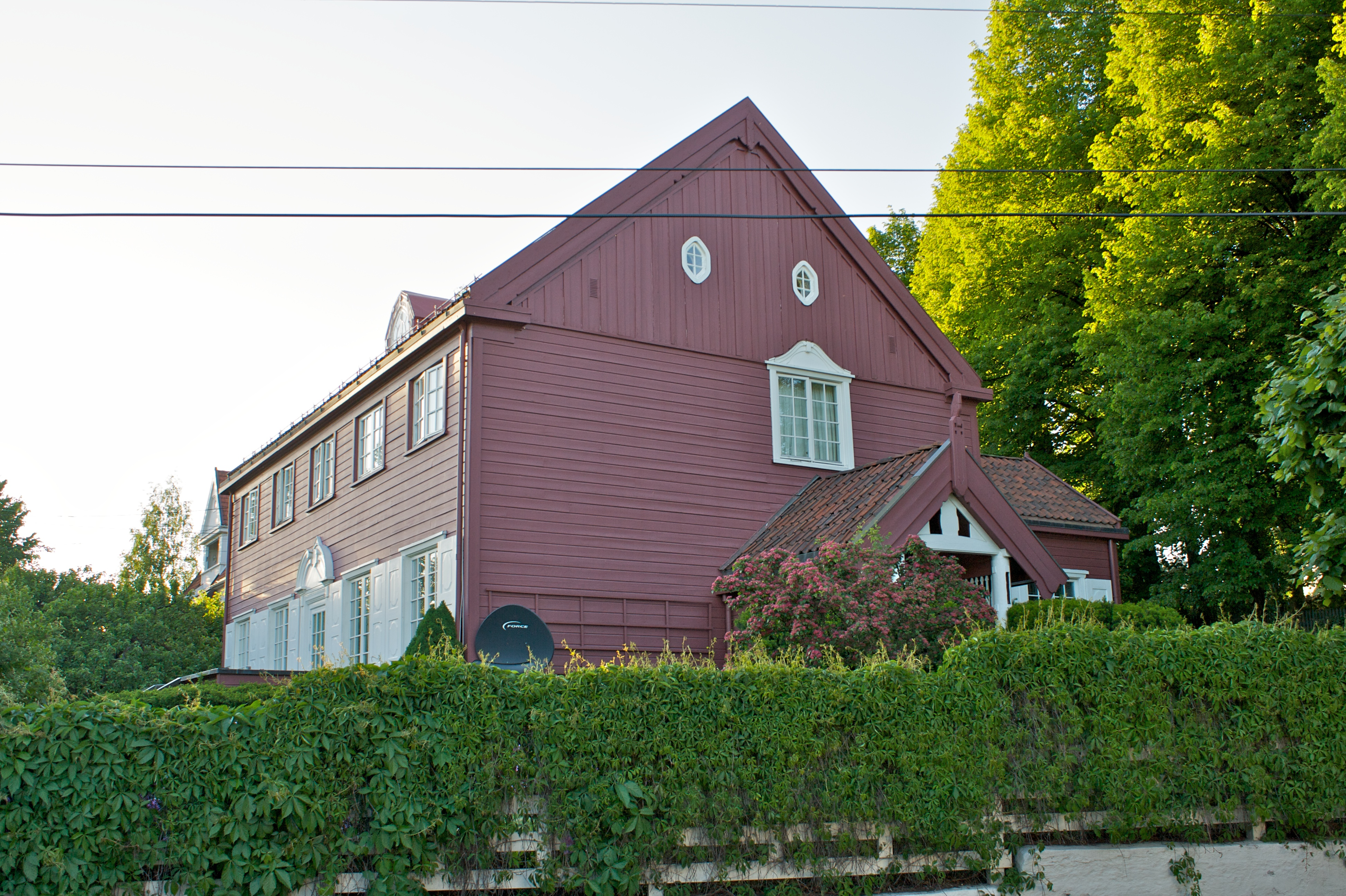 Madserud allé 32, Oslo.